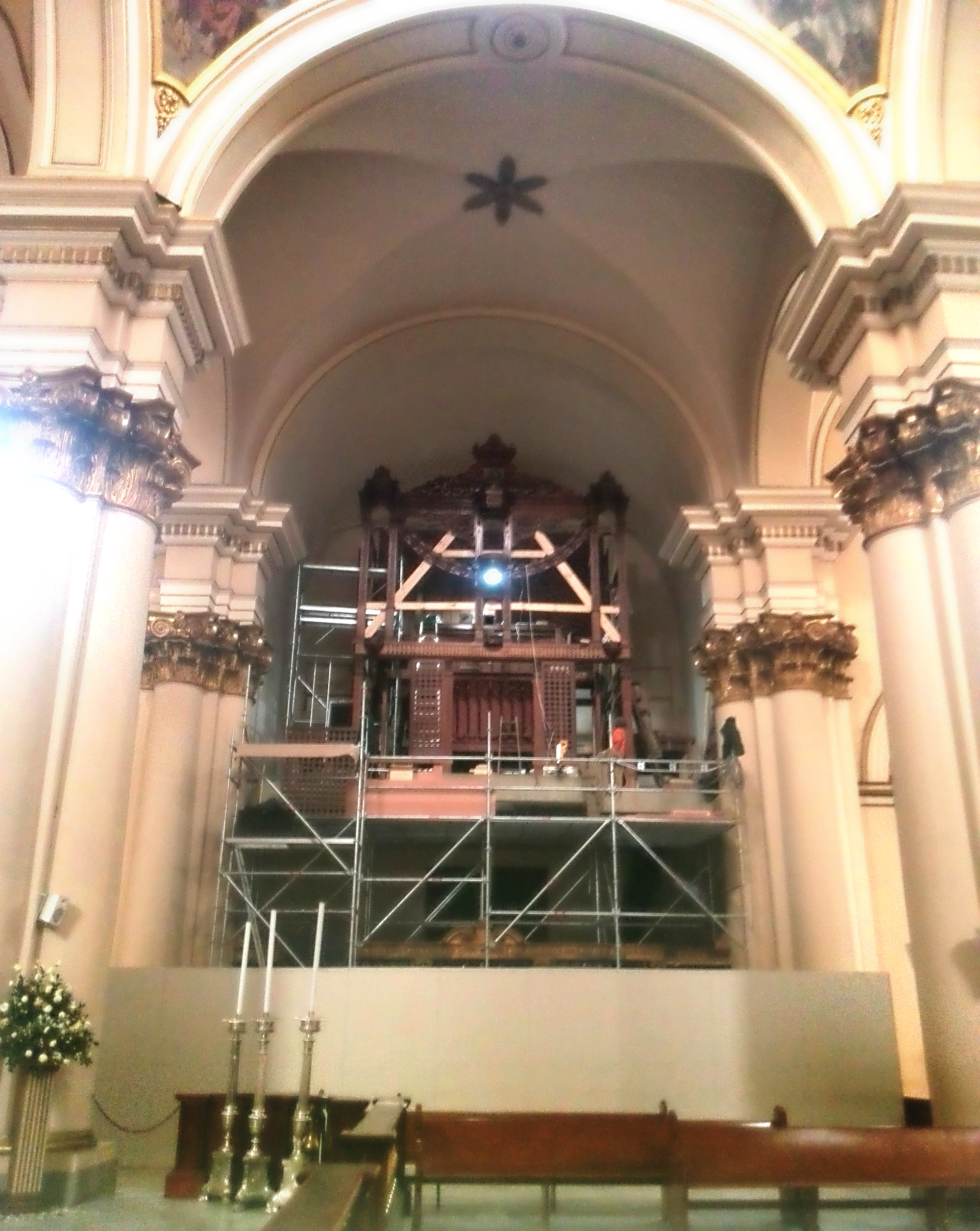 Restauración del Organo de la Catedral Primada de Colombia. Bogotá